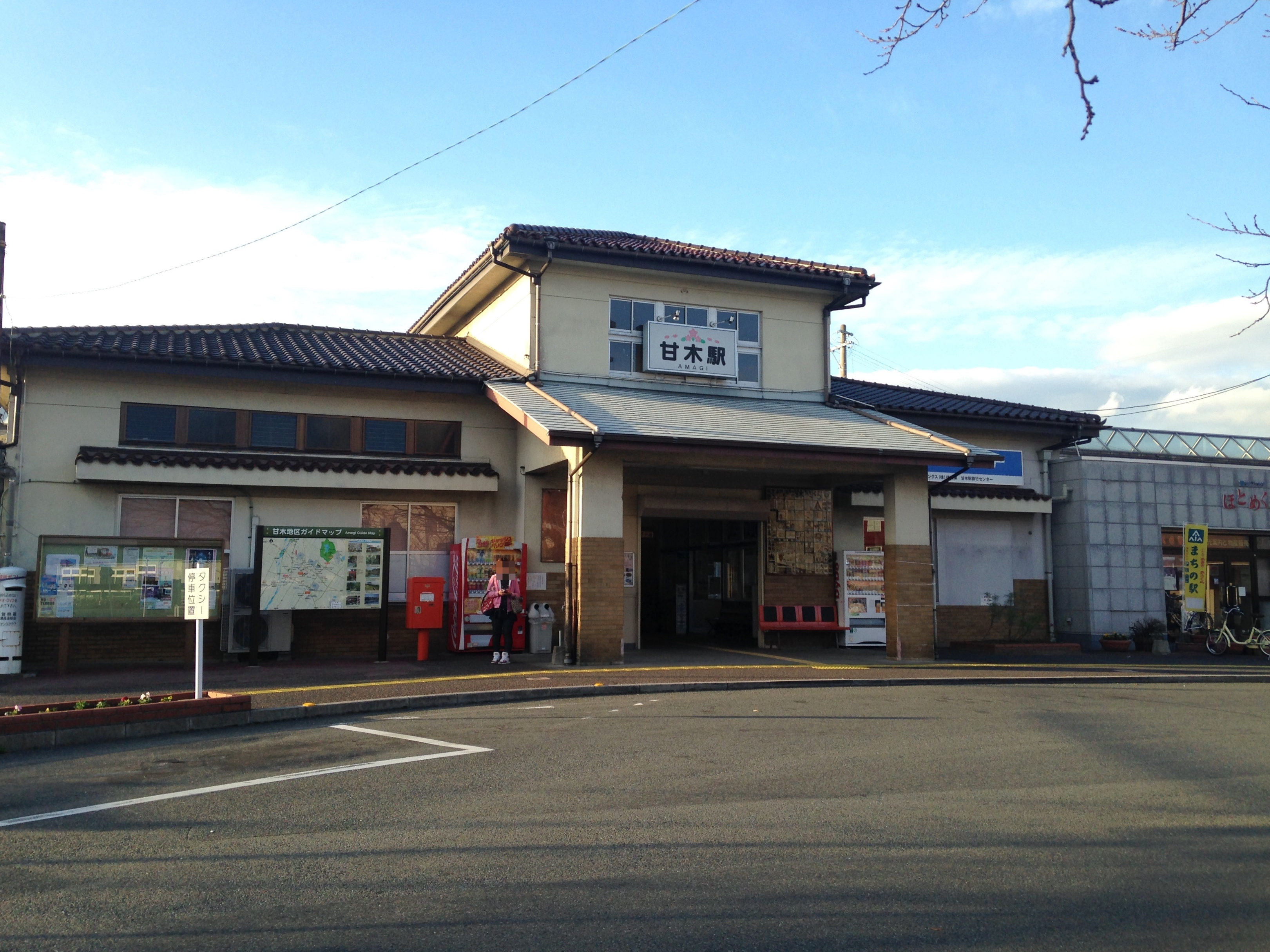 甘木駅(甘木鉄道)の駅舎